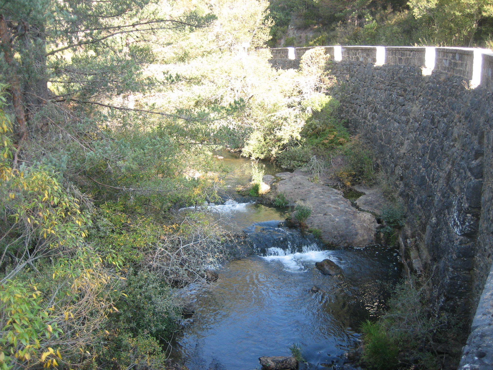 Puente sobre el río Cea en la intersección con la carretera LE-234.